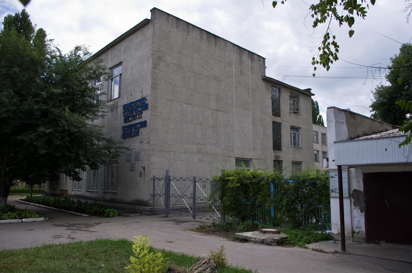 Инженерно-технический факультет Приднестровского государственного университета. Сейчас называется Инженерно-технический институт.